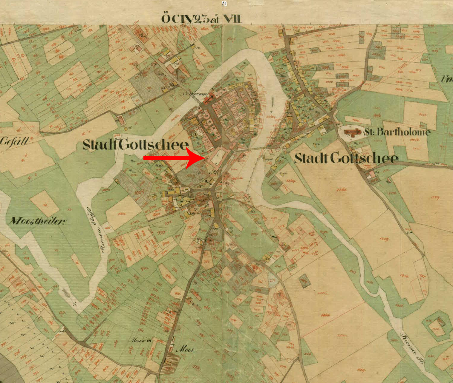 Franciscejski kataster za Kranjsko, 1823-1869